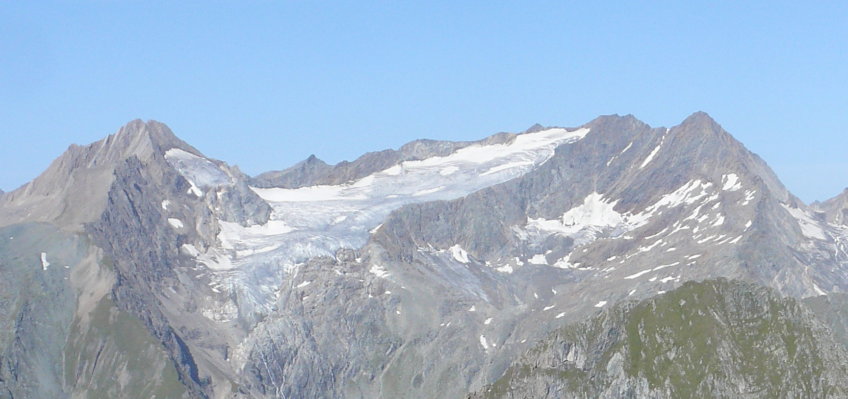 Malhamspitzen und Quirl (links) von Osten.